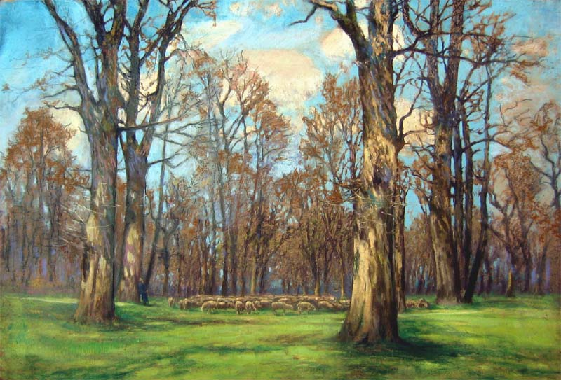 Česky: Dubový háj